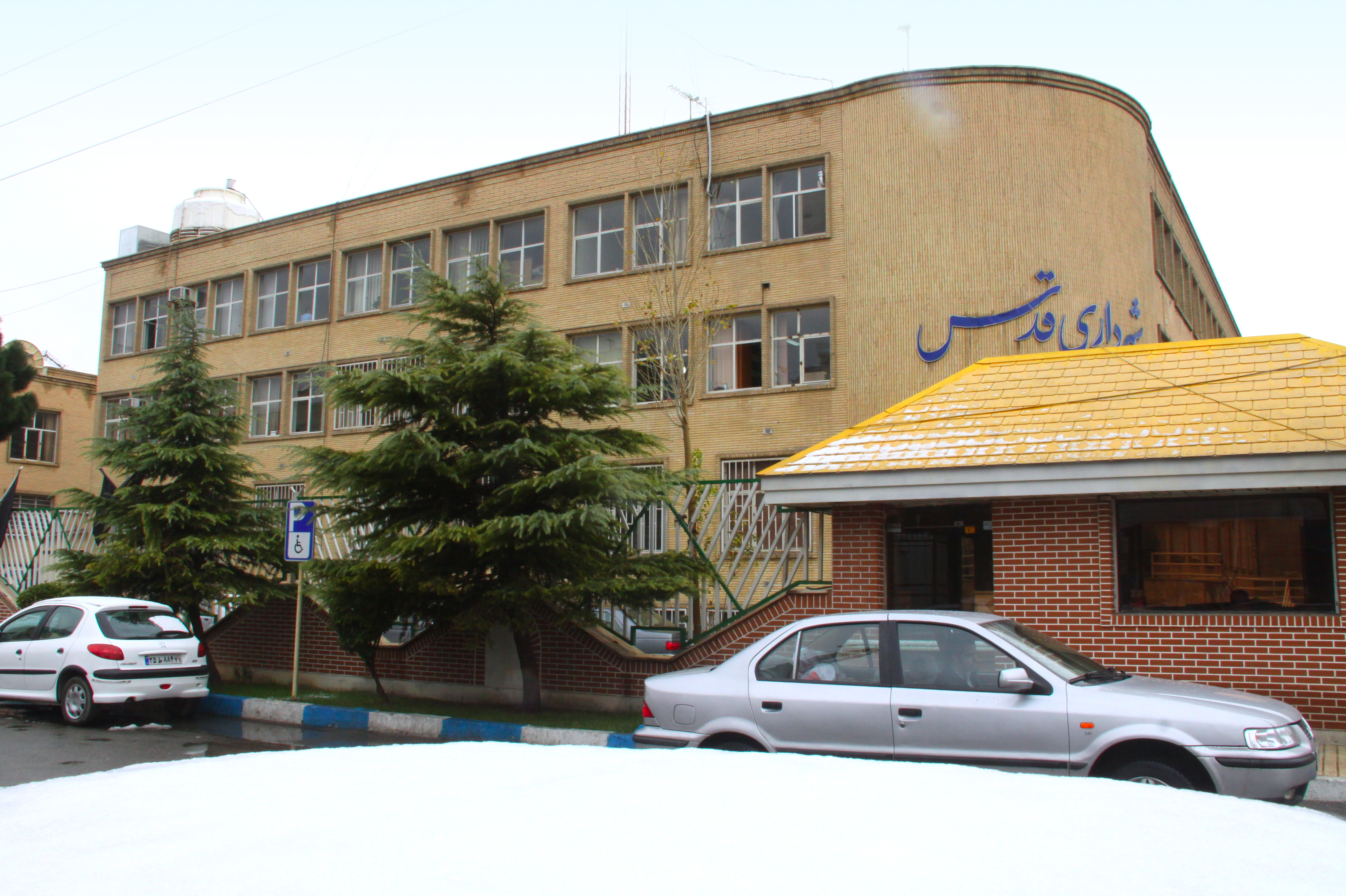 Ghods City / Tehran / Iran / Photo by: Alireza Habibi